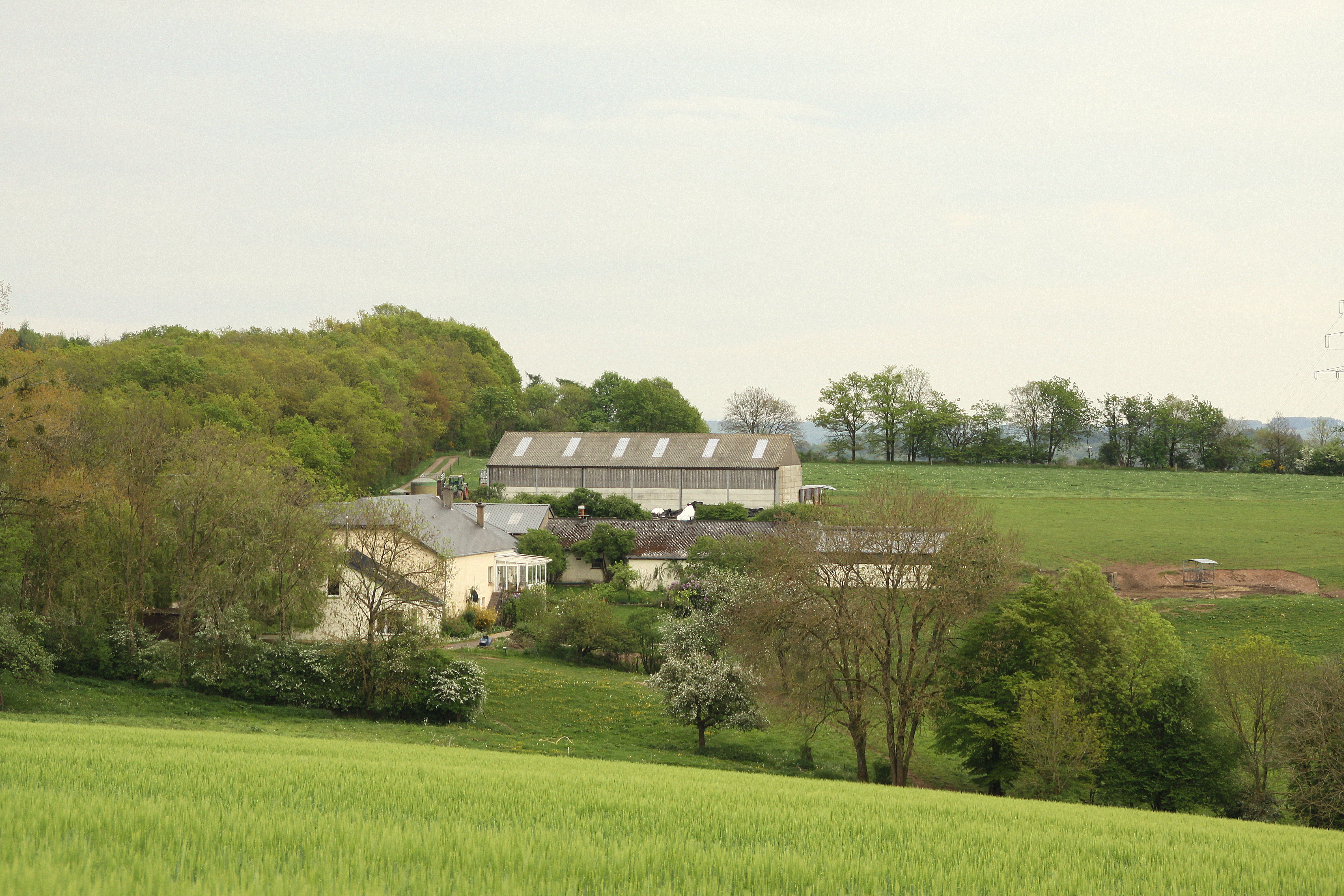 Den Haff an der Closdellt